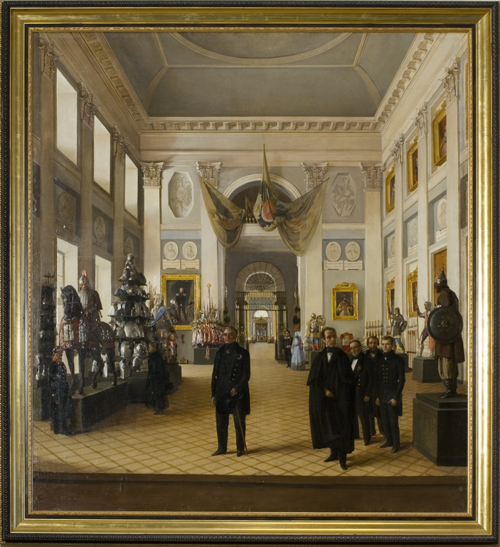 Холст, масло. На картине изображён один из залов старой Оружейной палаты, выстроенной по проекту И. В. Егорова у Троицких ворот Кремля в 1806-1809 гг. В центре - писатель М. Н. Загоскин, слева от него в группе (слева направо) помощник директора Оружейной палаты, историк А. Ф. Вельтман; помощник директора Оружейной палаты И. И. Давыдов; неизвестный музейный служитель, историк И. Е. Забелин.